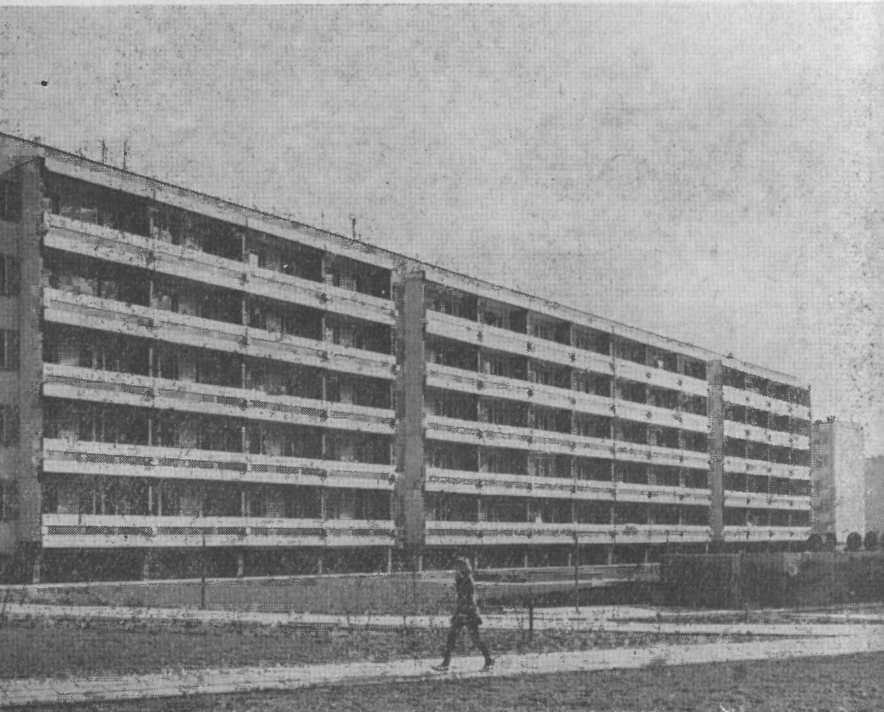 Os. Jagiellońskie - budynek nr 10 z 1970. Elewacja zachodnia, od ul. Zamenhofa